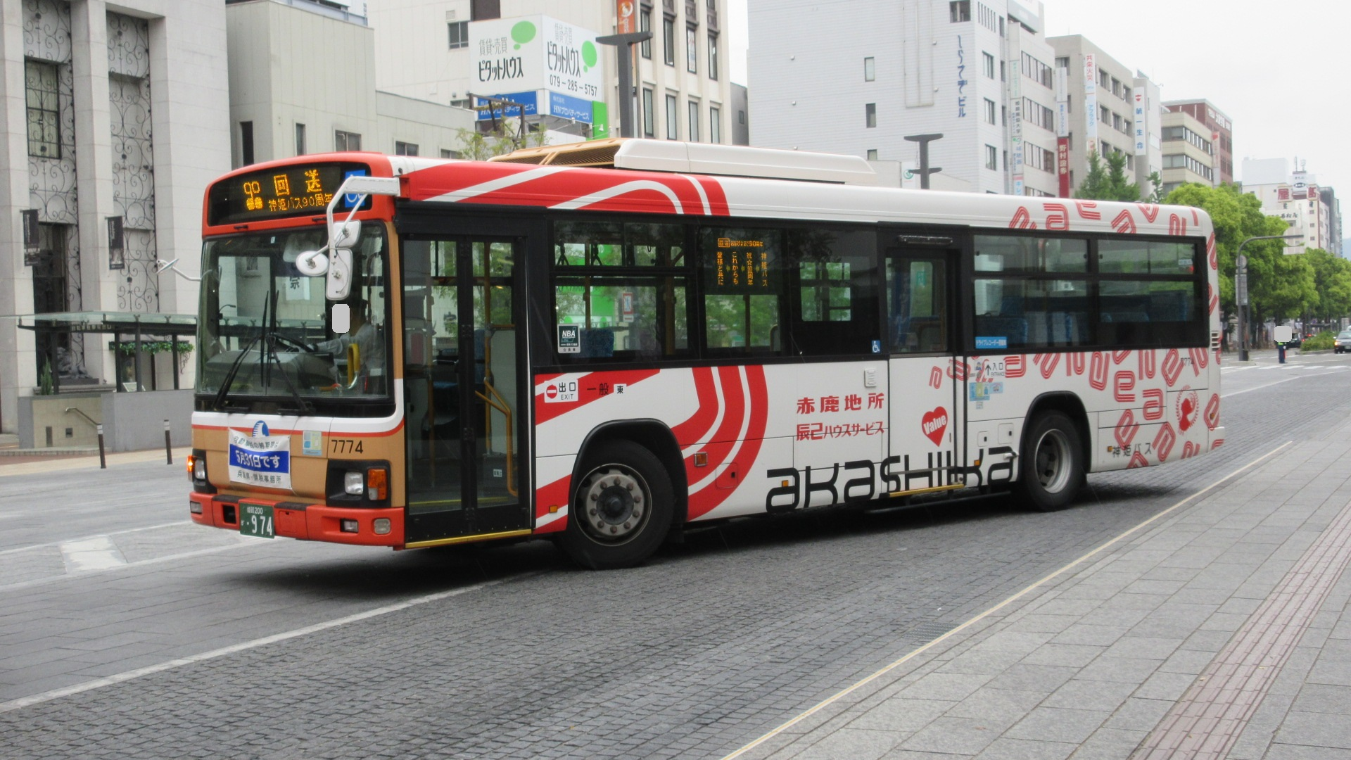 神姫バス7774（姫路駅前） ※赤鹿地所フルラッピング・90周年回送表示